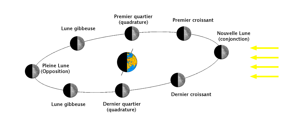 description : phases de la Lune source photo et travail personnel de Looxix